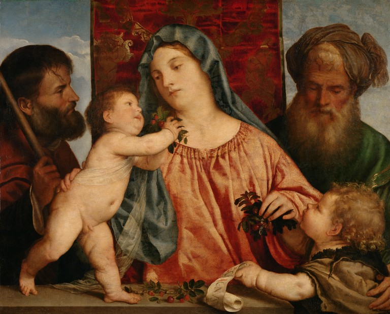 Kirschenmadonnatitle QS:P1476,de:"Kirschenmadonna" label QS:Lde,"Kirschenmadonna"